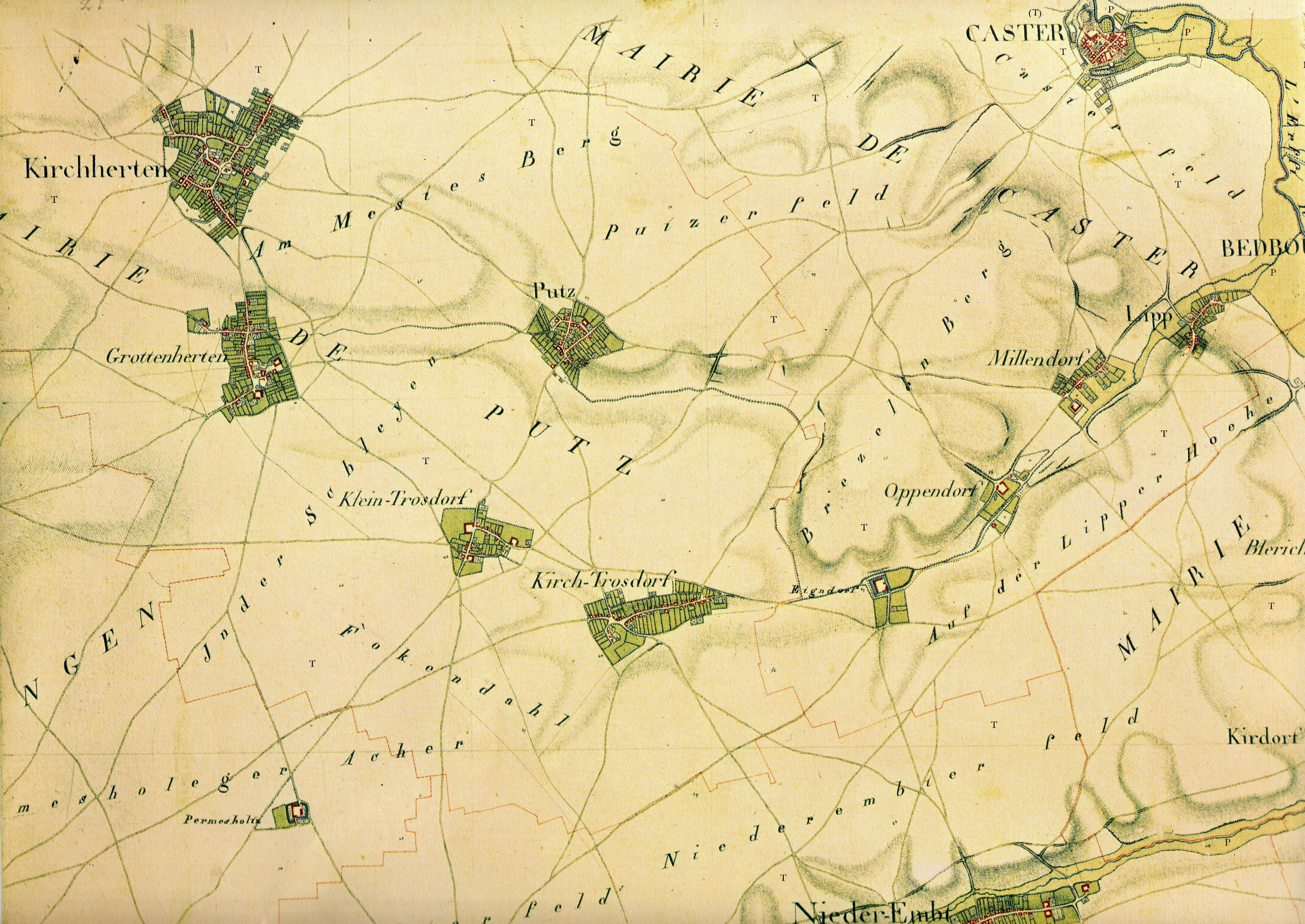 Kartenaufnahme der Rheinlande durch Tranchot und von Müffling